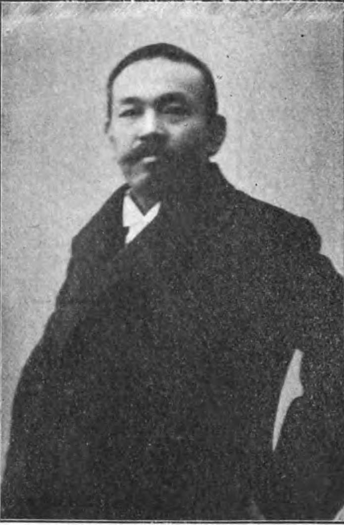 池辺吉太郎（号・三山）、慶應義塾卒業。新聞『日本』記者、『大阪朝日新聞』主筆、『東京朝日新聞』主筆